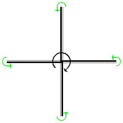 Radiometer. Strömning i gasen (gröna pilar) som sätts igång av att de svarta sidorna är varmare än de blanka. Som en reaktion sätter radiometern igång att rotera i motsatt riktning.